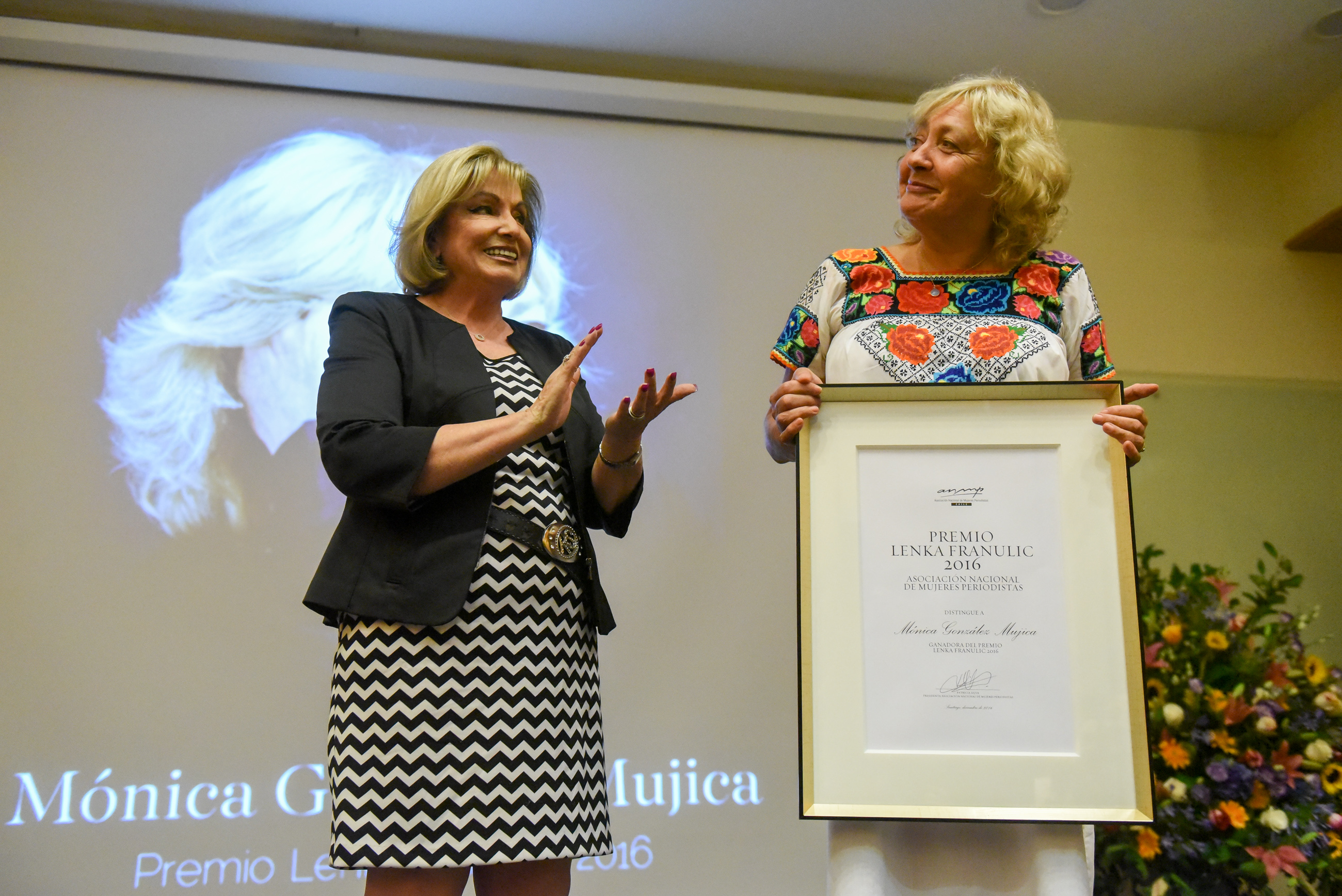 Ministra Narváez asiste a la entrega del premio Lenka Franulic